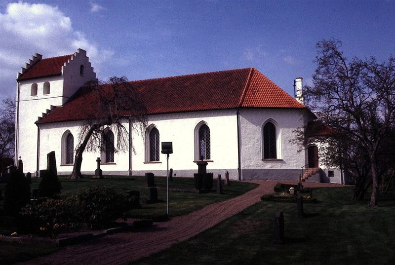 Ekeby kyrka, Skåne i Skåne, Sverige. Ekeby kirke